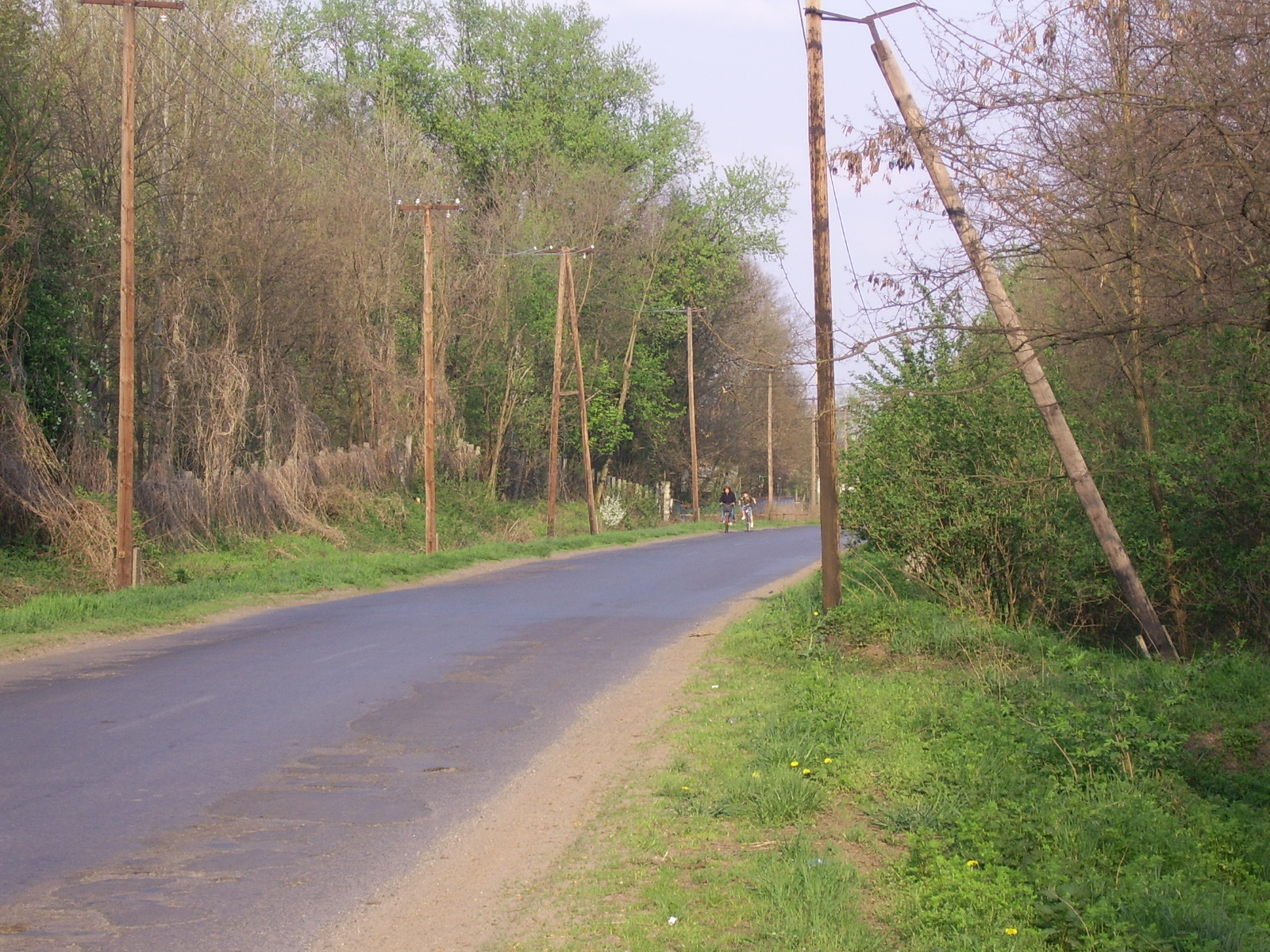 A 4901-es közút Balkány határában, a 17-es kilométerkőtől nem messze